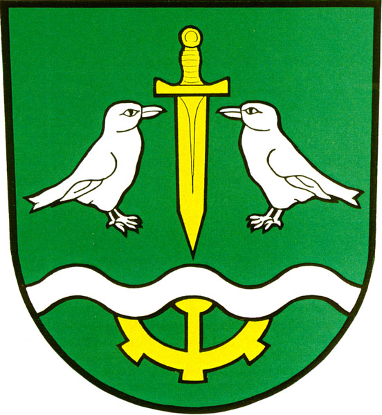 Znak obce Široká Niva